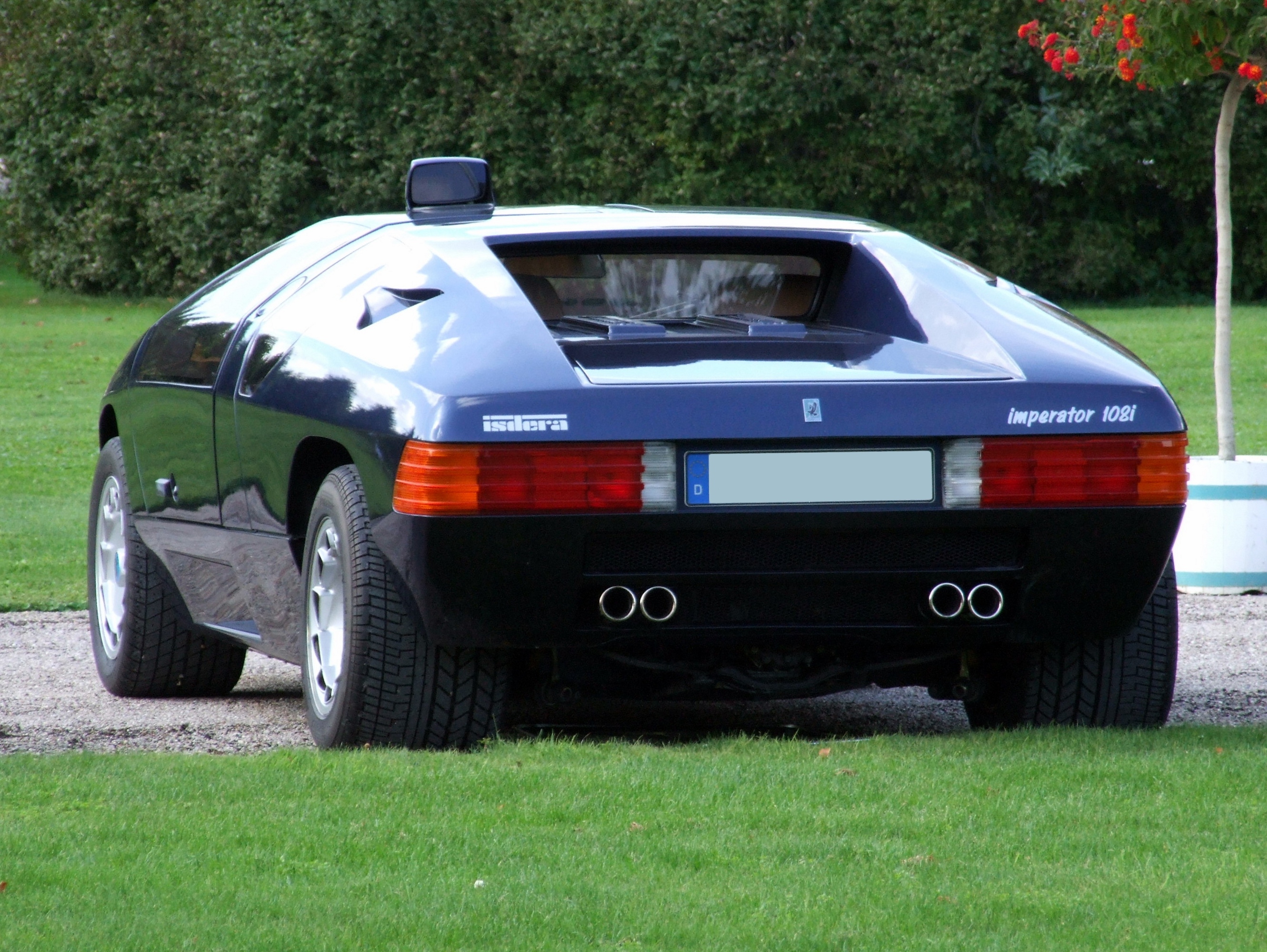 Isdera Imperator 108i Serie 1 (1984 - 1991)